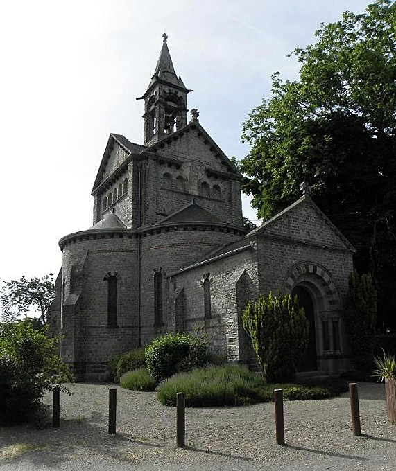 Chapelle Notre-Dame-de-Beauvais au Theil-de-Bretagne (35).